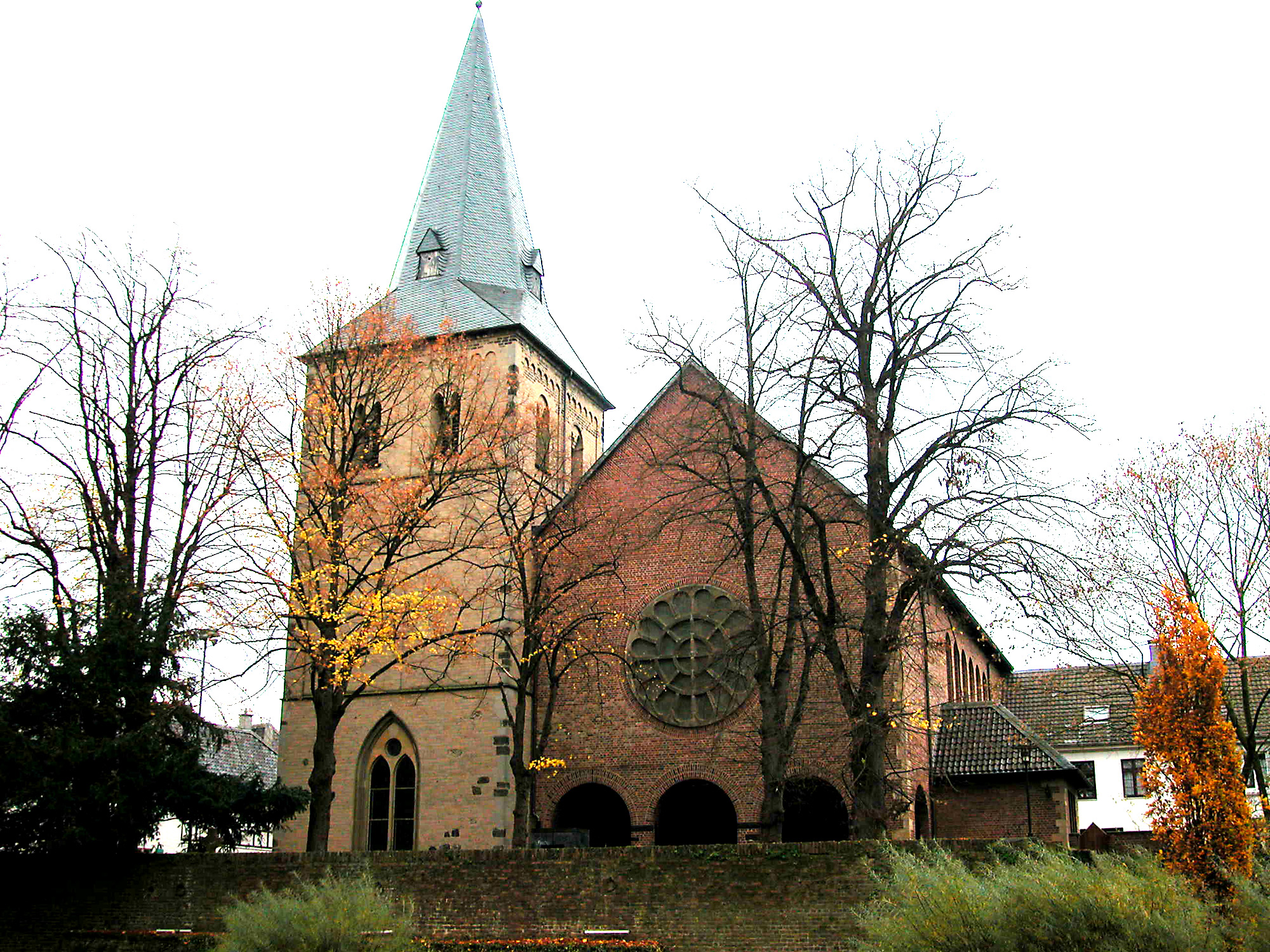 St. Gereon, Monheim am Rhein, NRW, Deutschland (Germany)